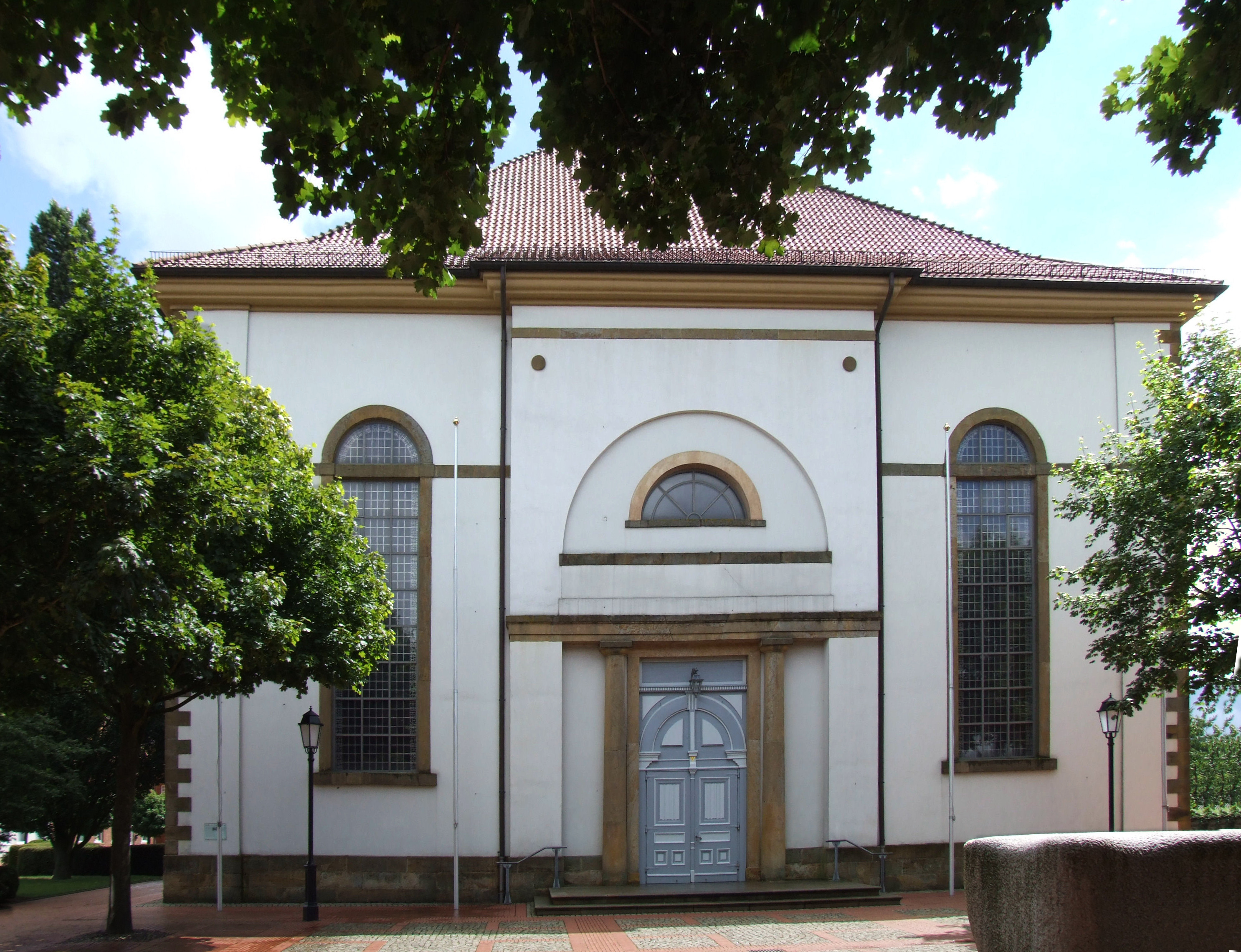 Pfarrkirche St. Vitus in Löningen